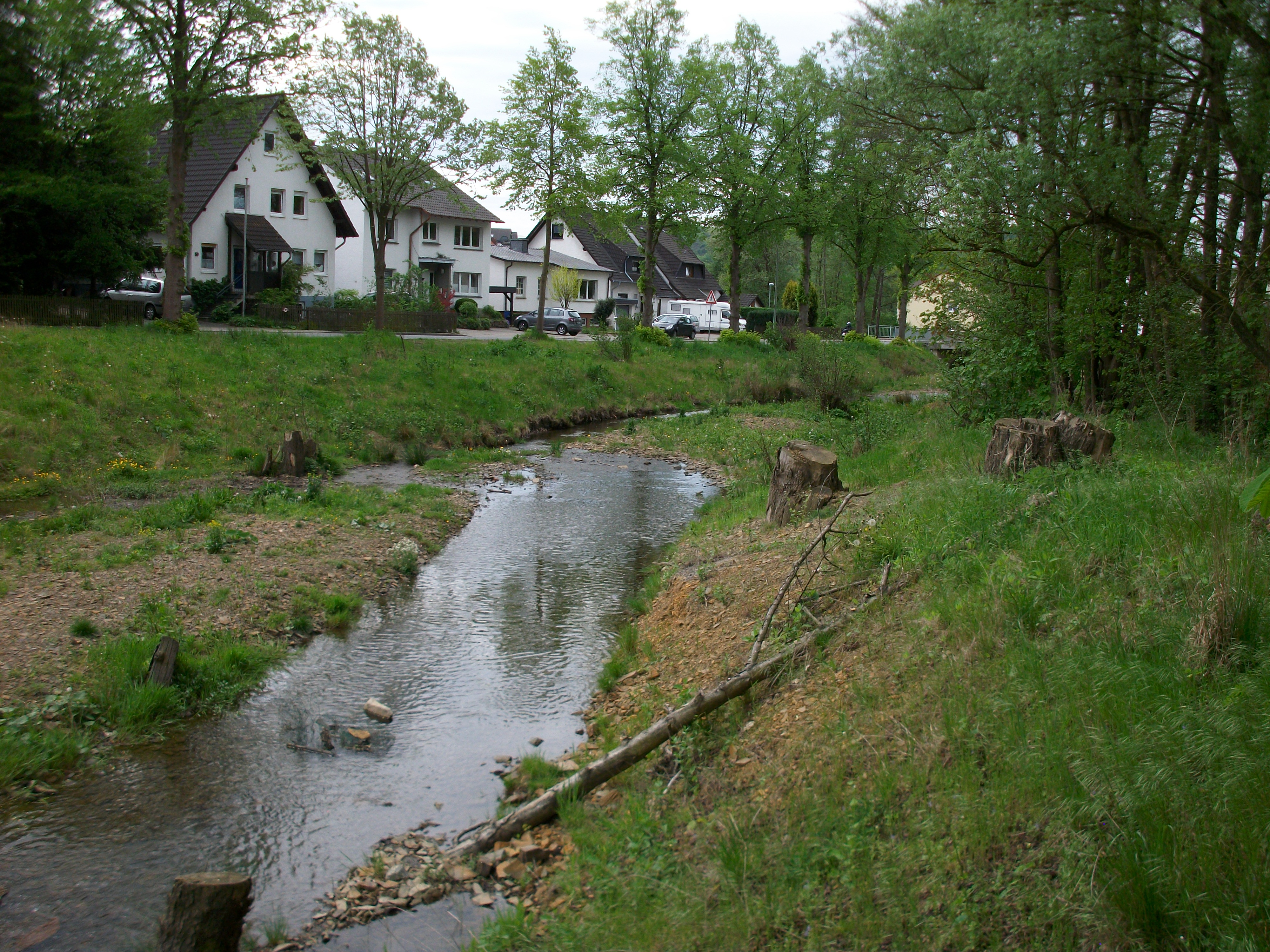 Die Wanne als Nebengewässer der Ruhr, Bachlauf innerhalb von Arnsberg-Niedereimer